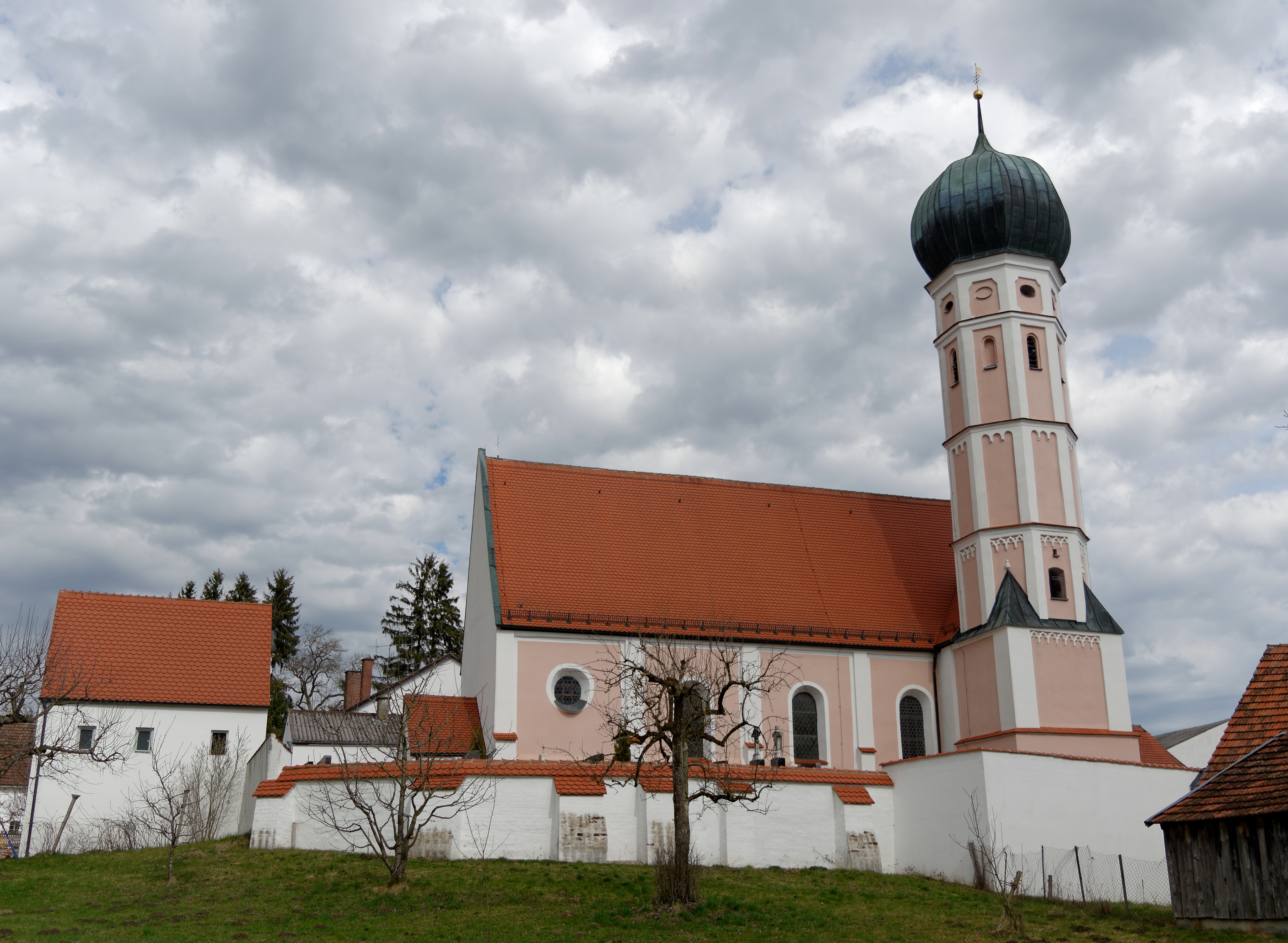 Saalbau mit Stichkappentonne und eingezogenem Chor, südlicher Zwiebelturm, im Kern 15. Jahrhundert, um 1705 erneuert. Bayerische Denkmalliste Nr. D-7-71-141-15